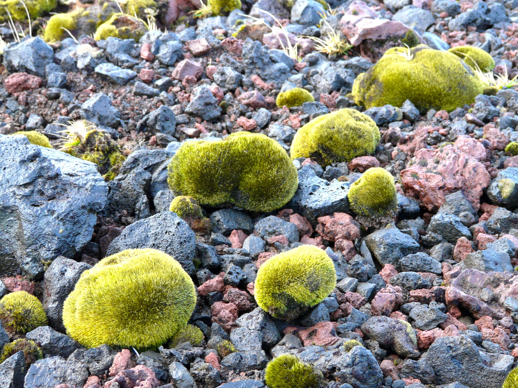 mousses sur le fell field: Ditrichum strictumLycopodium magellanicum